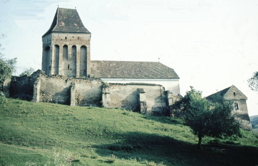 Kirchenburg in Buzd, 1966 02